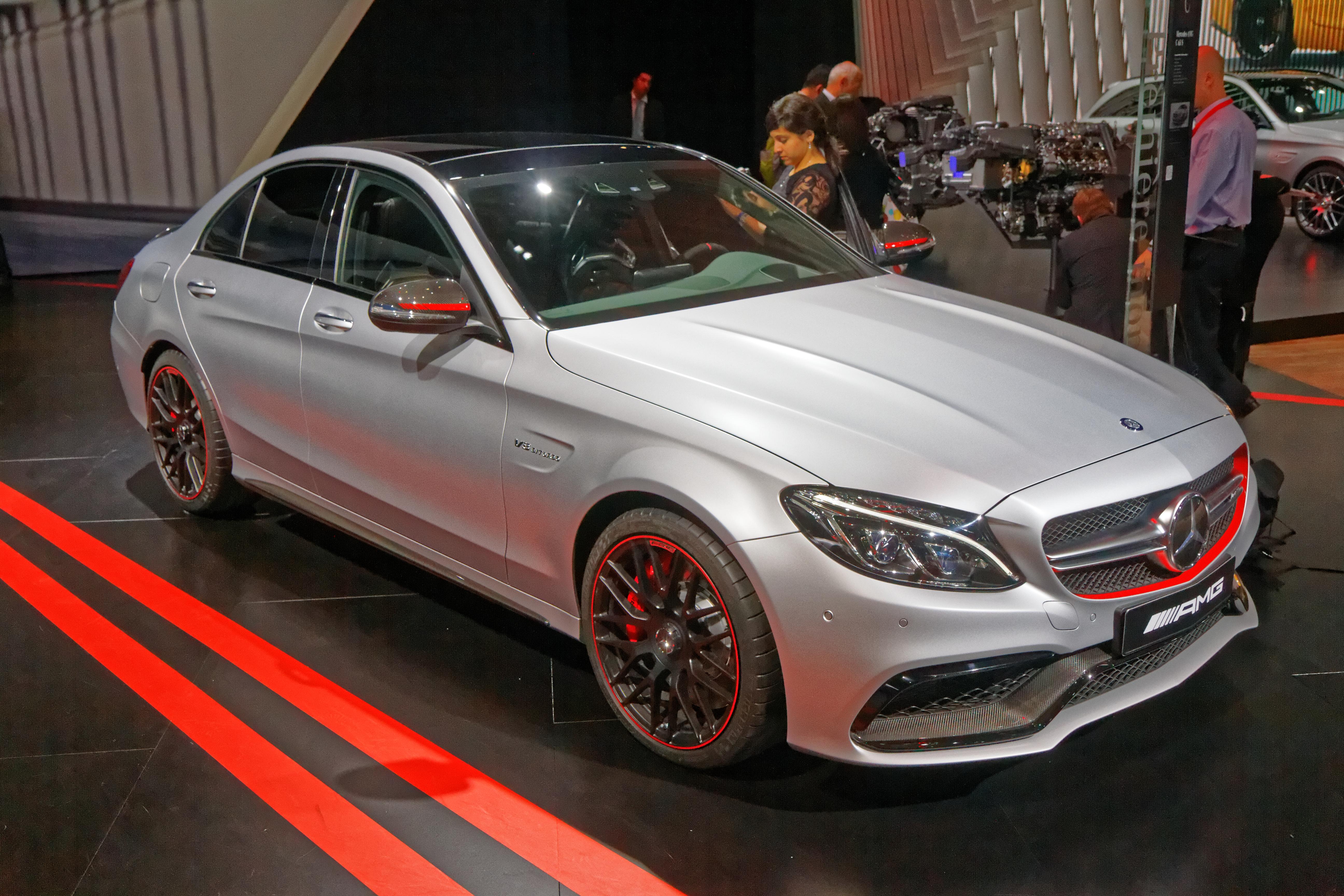 Une Mercedes-AMG C 63 S présentée lors du mondial de l'automobile de Paris 2014.